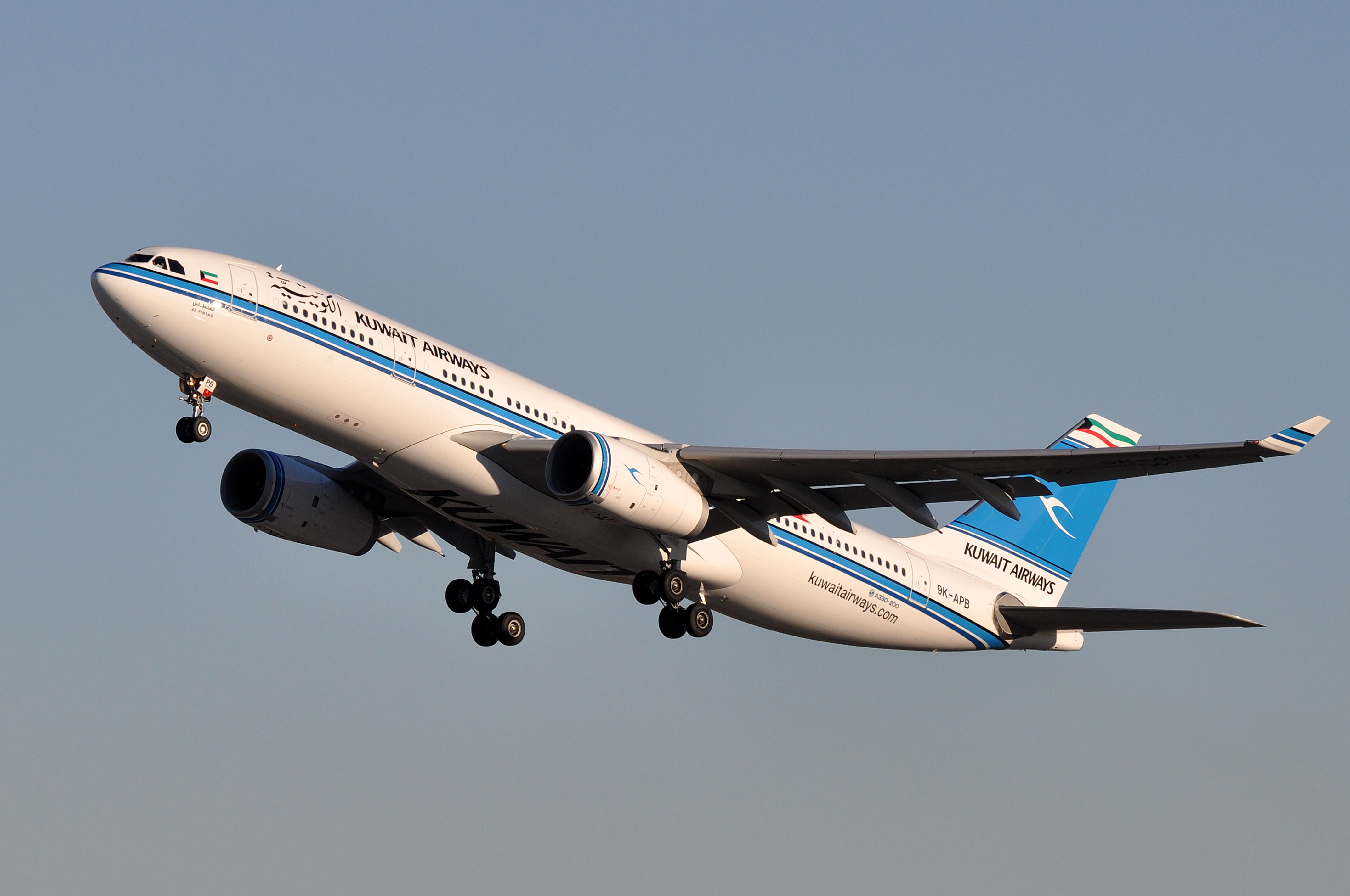 MSN 1643 A330-243 KUWAIT AIRWAYS FCO AIRPORT